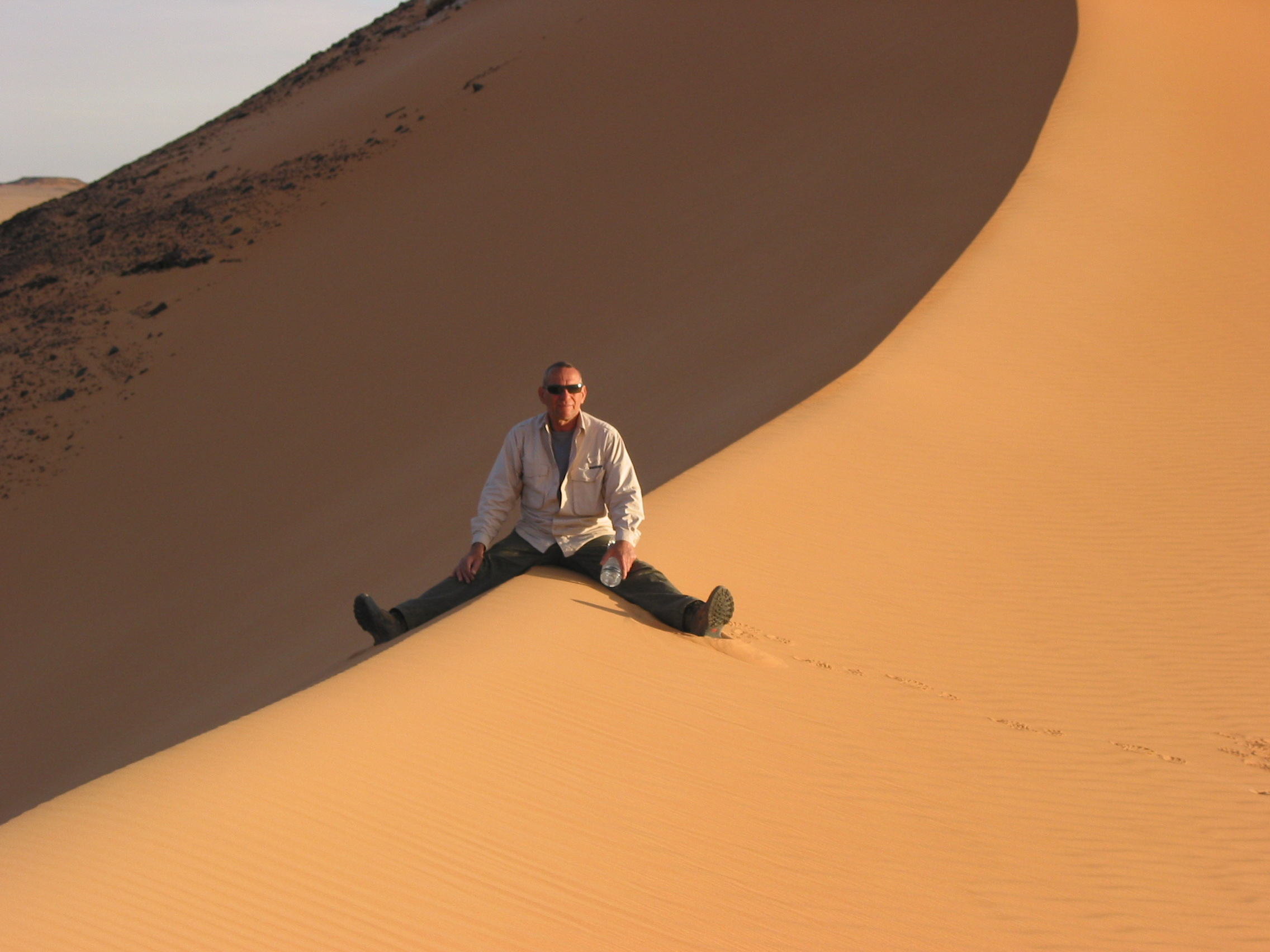 חגי רון במדבר המערבי